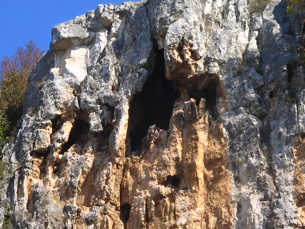 Горталово. Момина дупка.